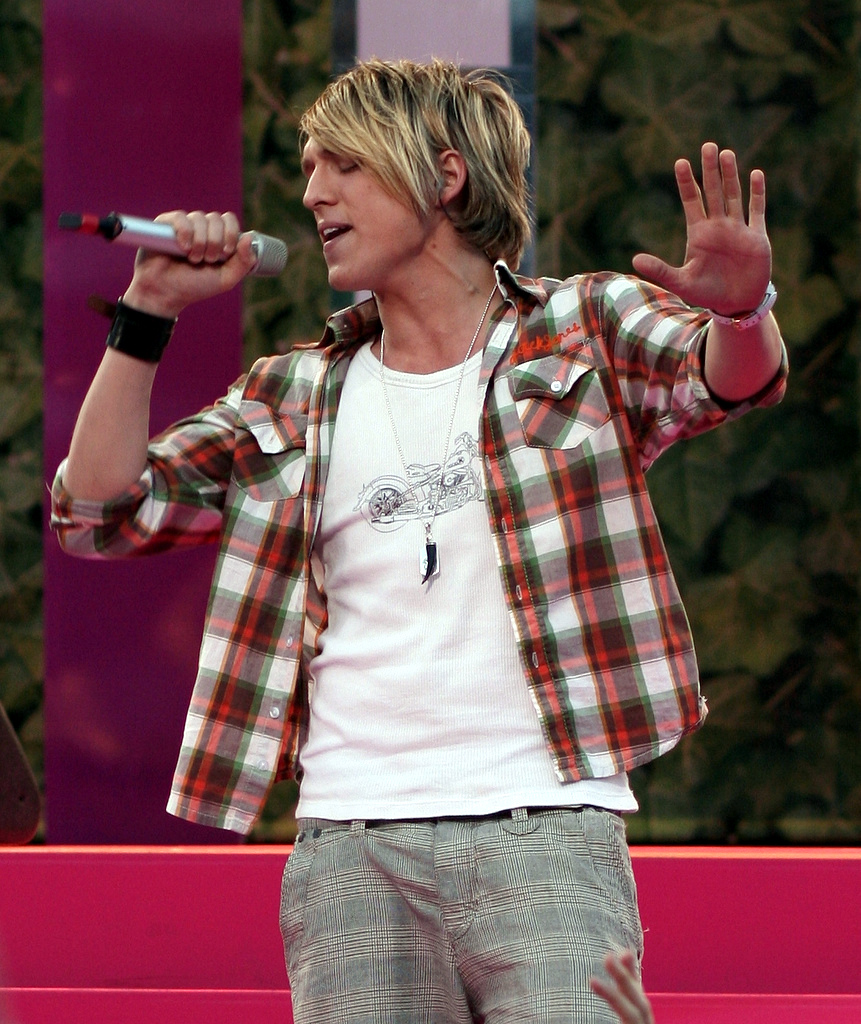 Danny Saucedo performing live during Sommarkrysset at Gröna Lund, Stockholm